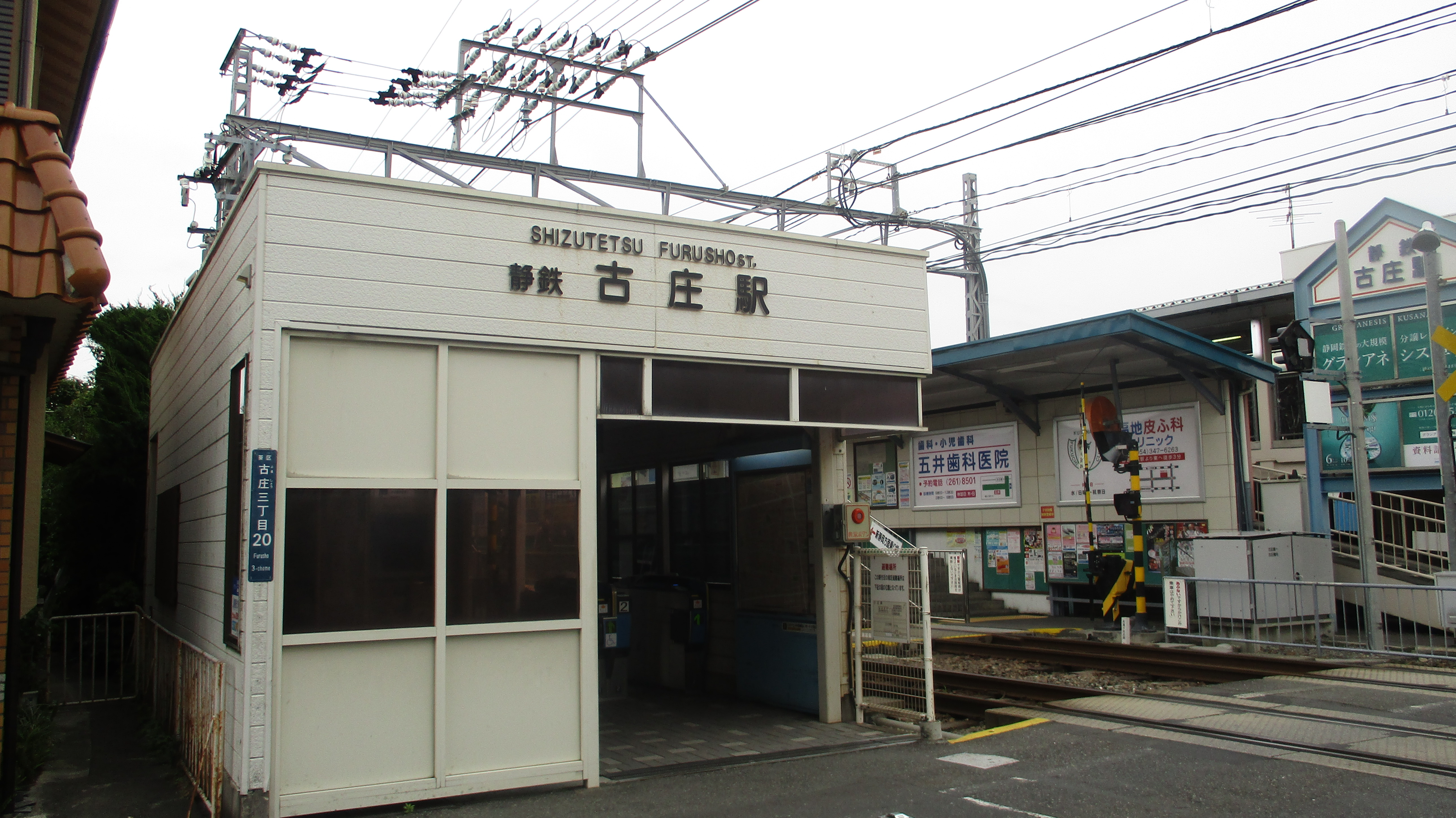 古庄駅の駅舎